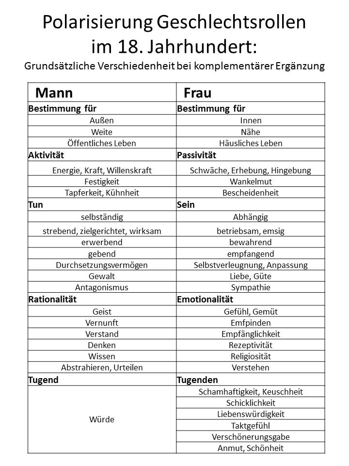 18 Jh Polarisierung Geschlechtsrollen